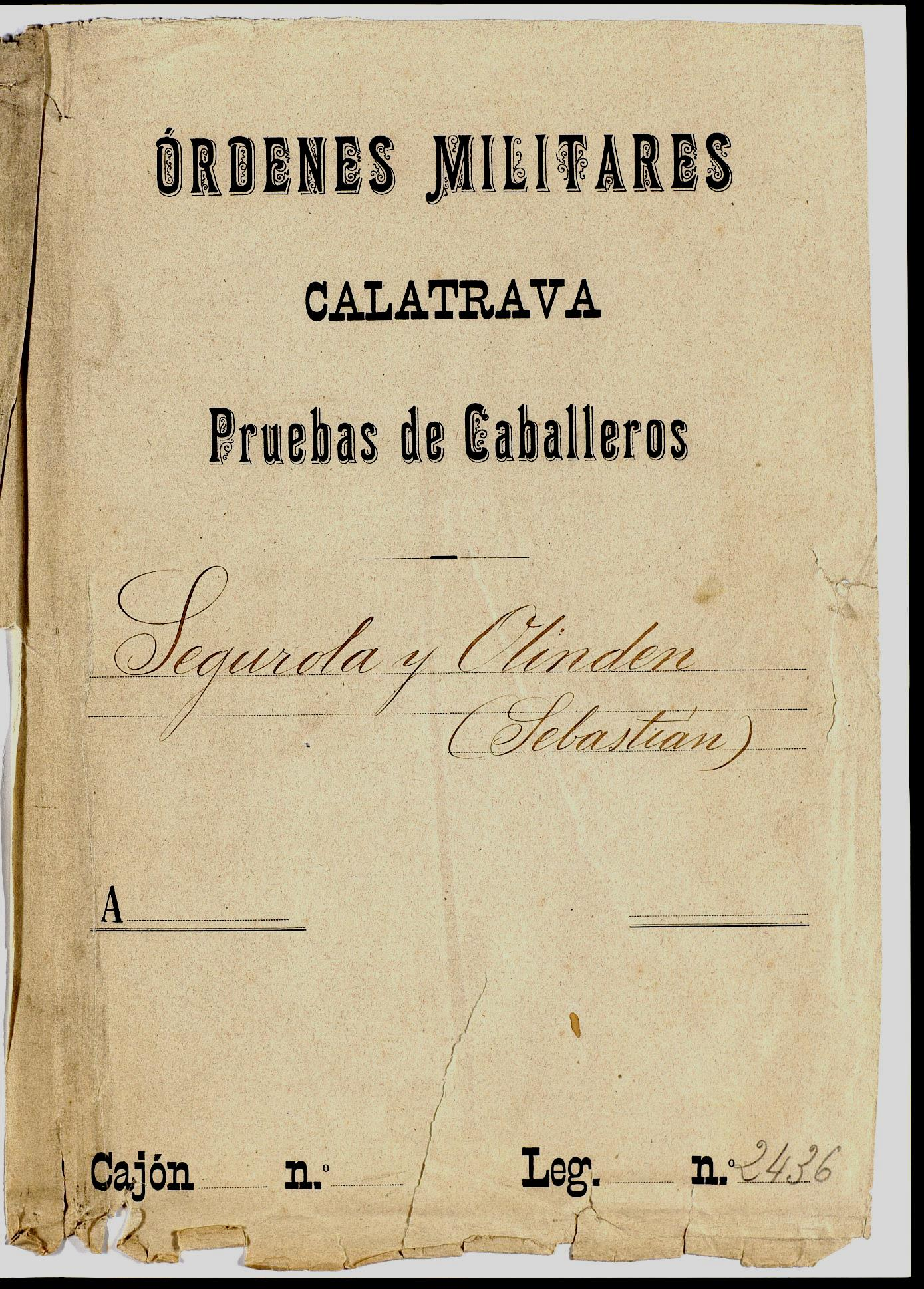 Carátula del expediente De Sebastián de Segurola y Oliden Zelayarán y Egaña para ingresar a la Orden de Calatrava. Año 1776